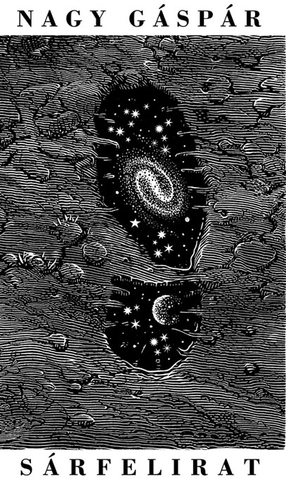 Nagy Gáspár: Sárfelirat című verseskönyvének címlapja Orosz István grafikájával